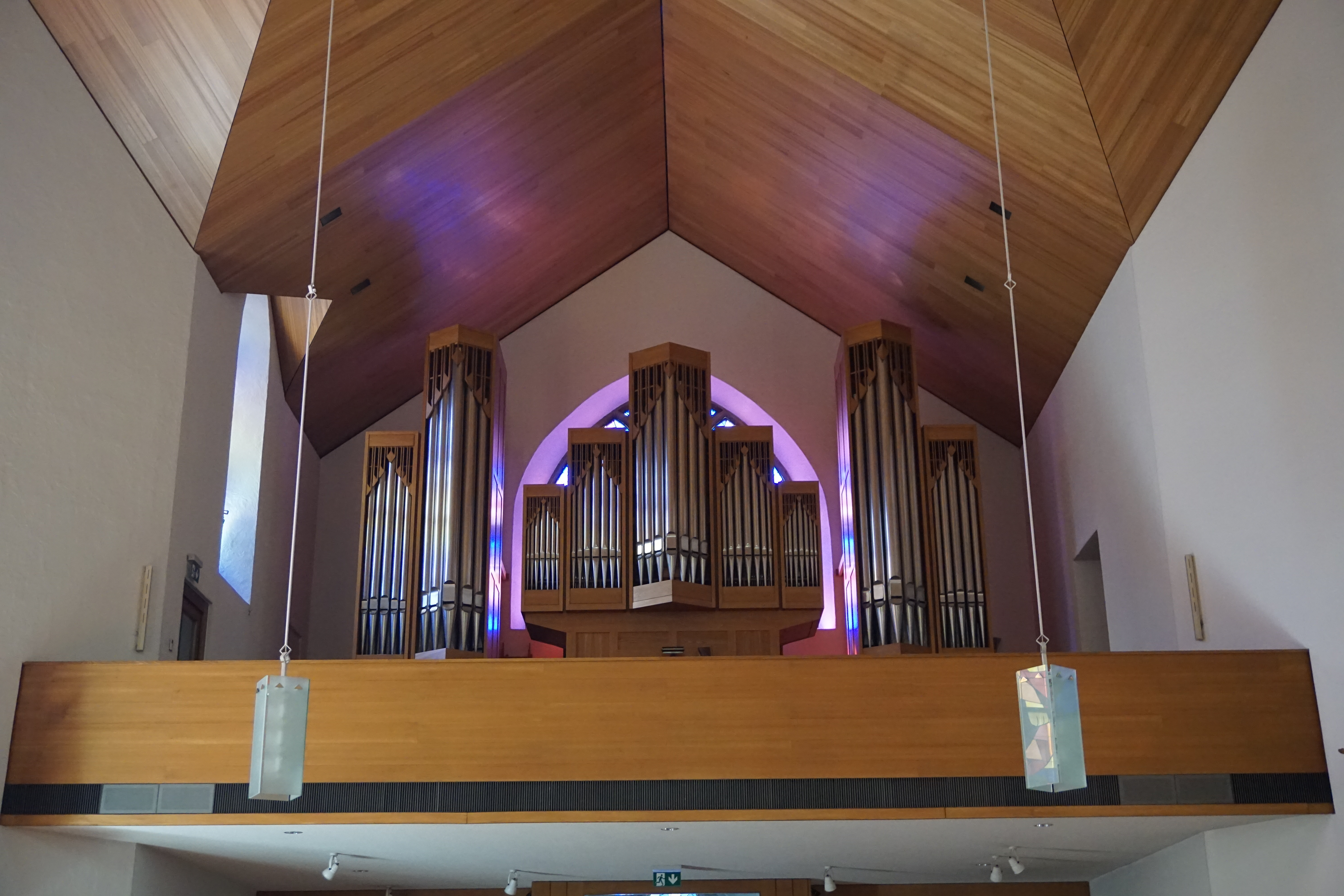 Orgel der Kirche zum Chorraum